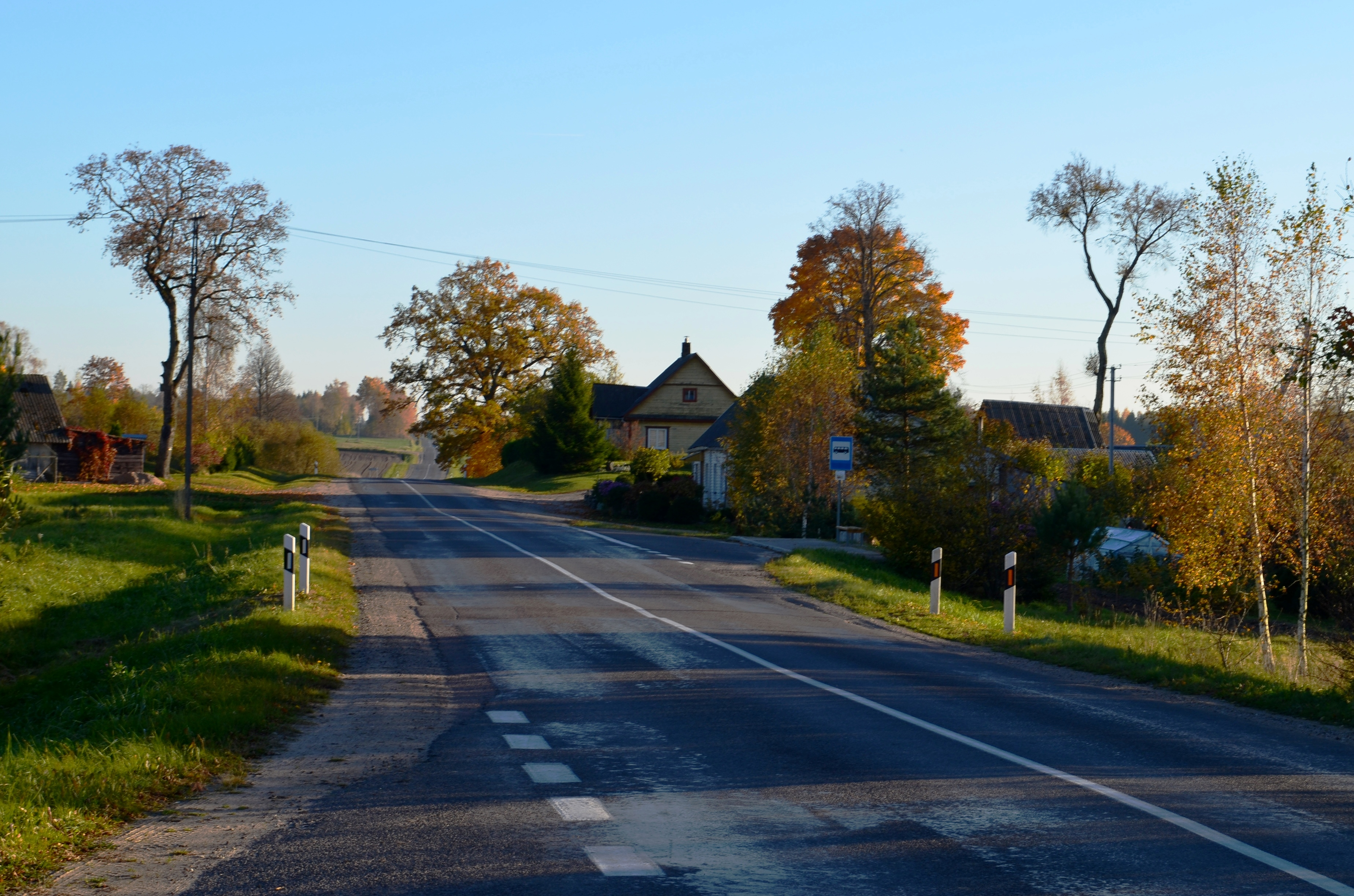 Avilčiai, Molėtų raj.